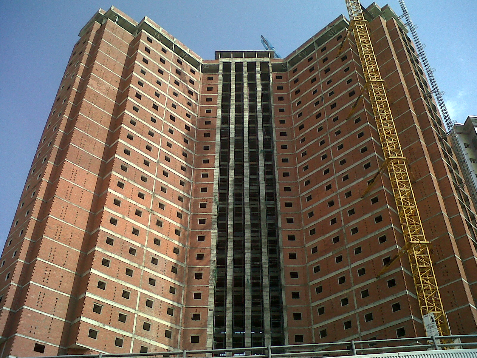 Al Maabdah, Mecca 24236, Saudi Arabia